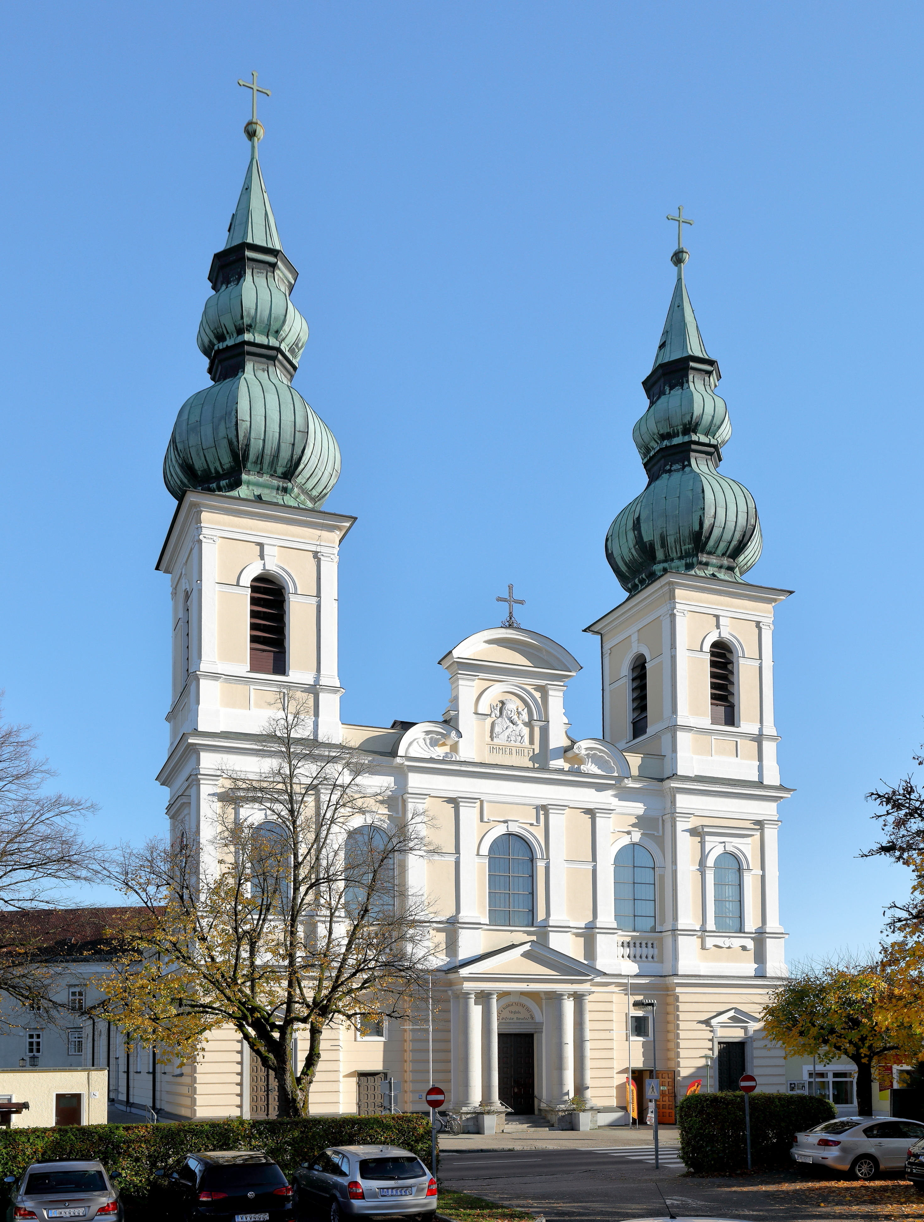 Frontansicht der Wallfahrt- und Pfarrkirche Maria Puchheim in der oberösterreichischen Stadt Attnang-Puchheim.Der erste Spatenstich für die Wallfahrtskirche fand am 24. Feb. 1886 statt, die feierliche Grundsteinlegung am 27. Juni 1886 und die Konsekration am 5. August 1890. Die Innenausgestaltung und Einrichtung dauerten jedoch noch bis August 1896 an. Im Jahr 1951 wurde die Kirche zur „Basilika minor“ erhoben und ist seit der Pfarrerrichtung „Maria Puchheim“ am 1. Februar 1968 auch eine Pfarrkirche.